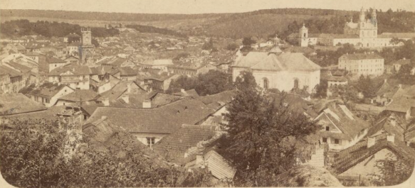 Бучач після 1877